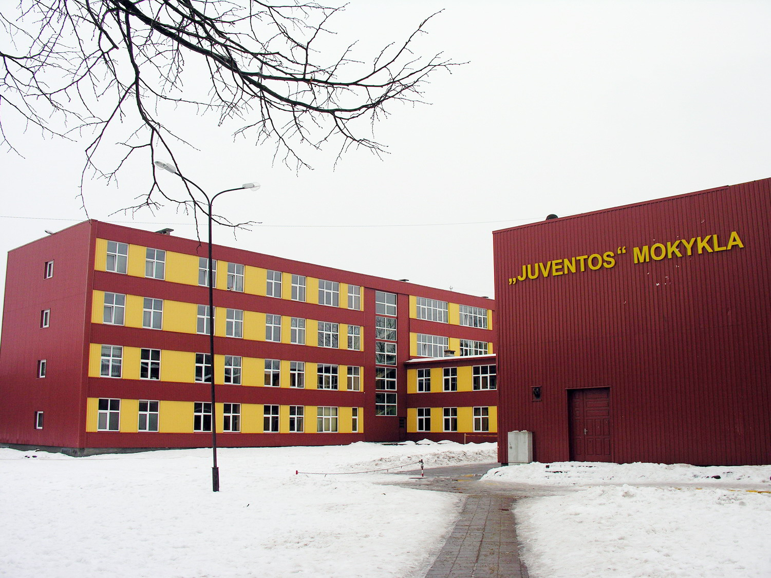 Šiaulių Juventos aštuonmetė mokykla 2007 m. vasario 28 d., Lietuva